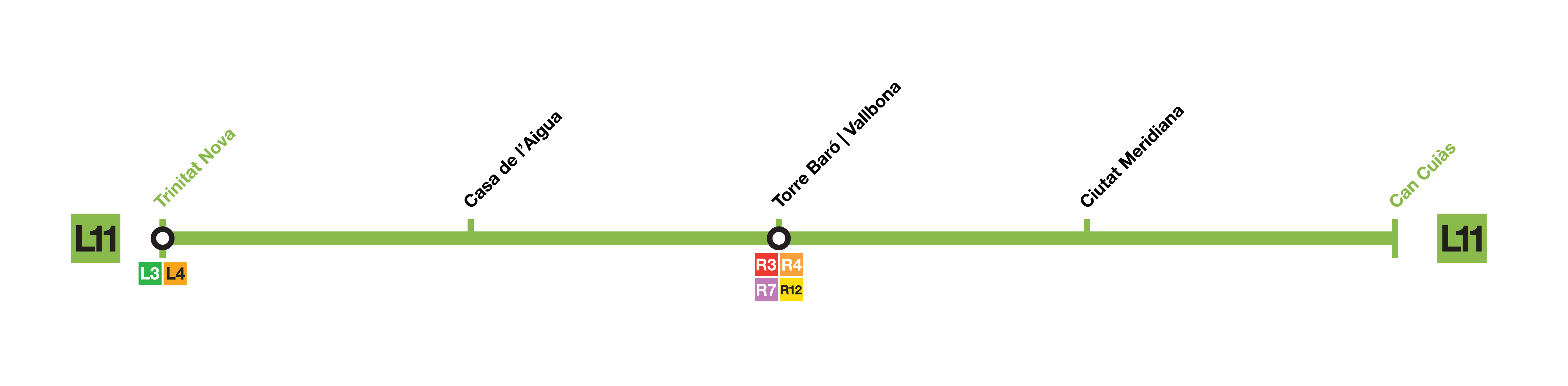 Térmometro de la L11 del Metro de Barcelona